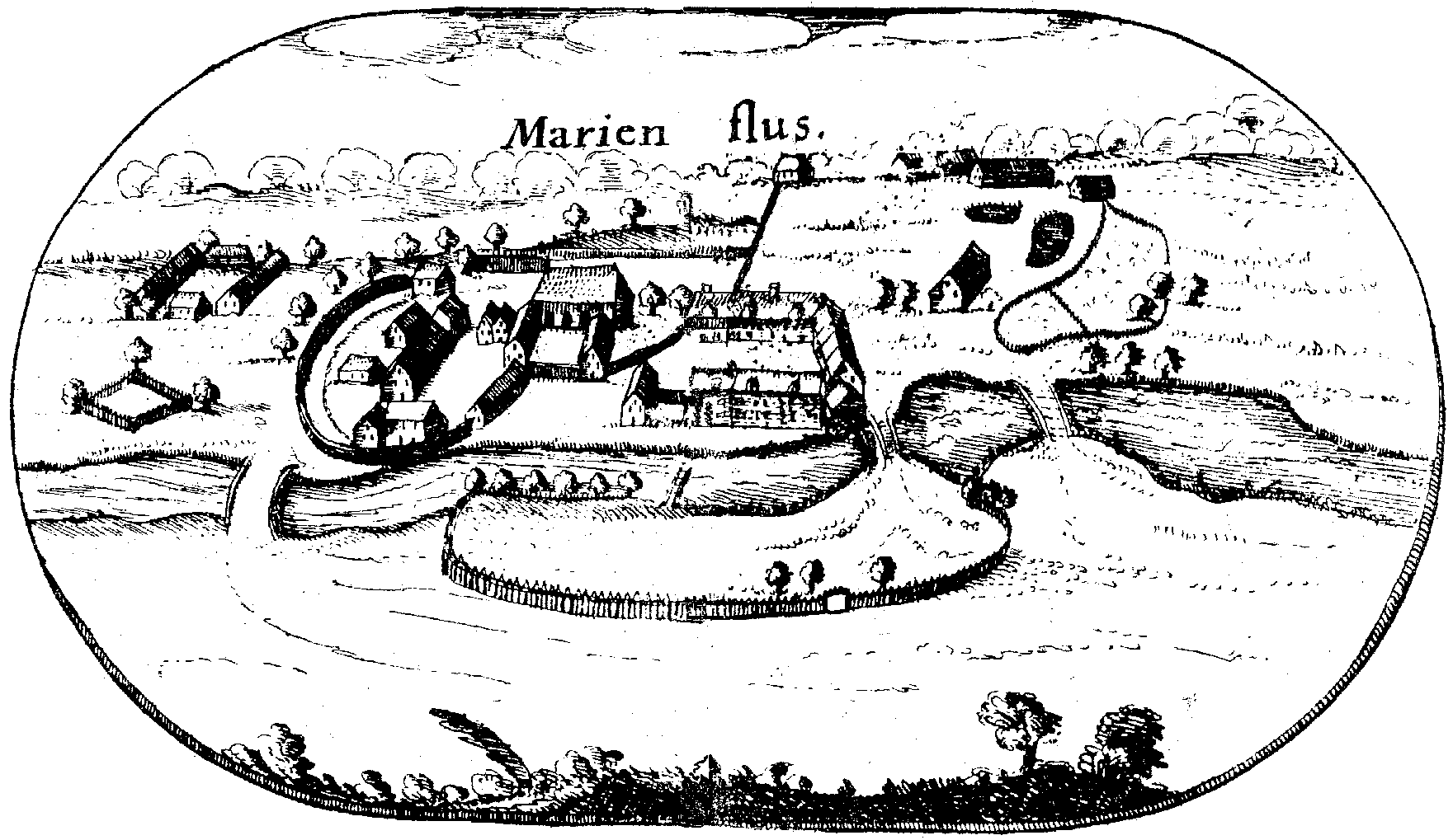 Rycina Marianowa z mapy Lubinusa - Mapa księstwa pomorskiego z 1618 roku.